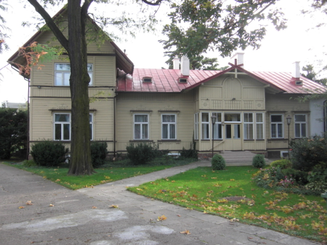 Zbór Warszawa-Wola Kościoła Zielonoświątkowego, ul. Połczyńska 59